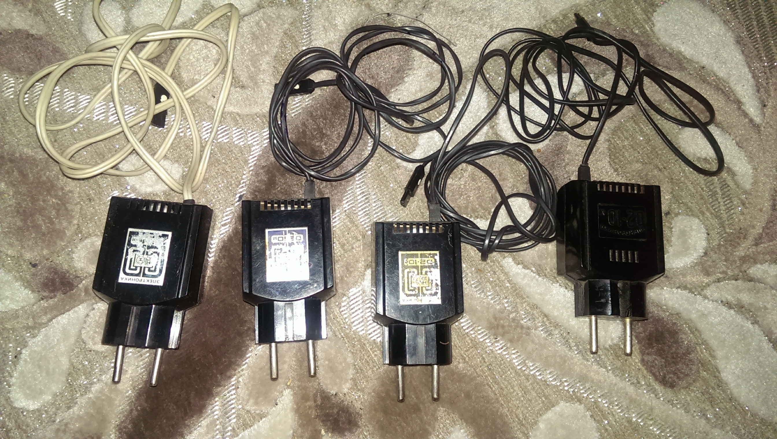 Блоки питания "Электроника Д2-10М" разных лет выпуска.